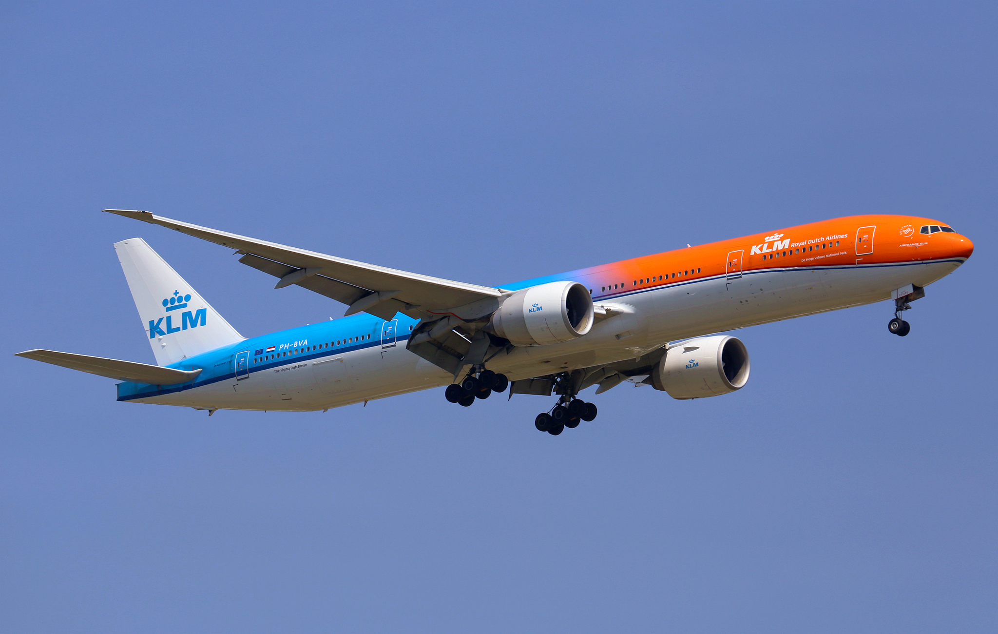 PH-BVA